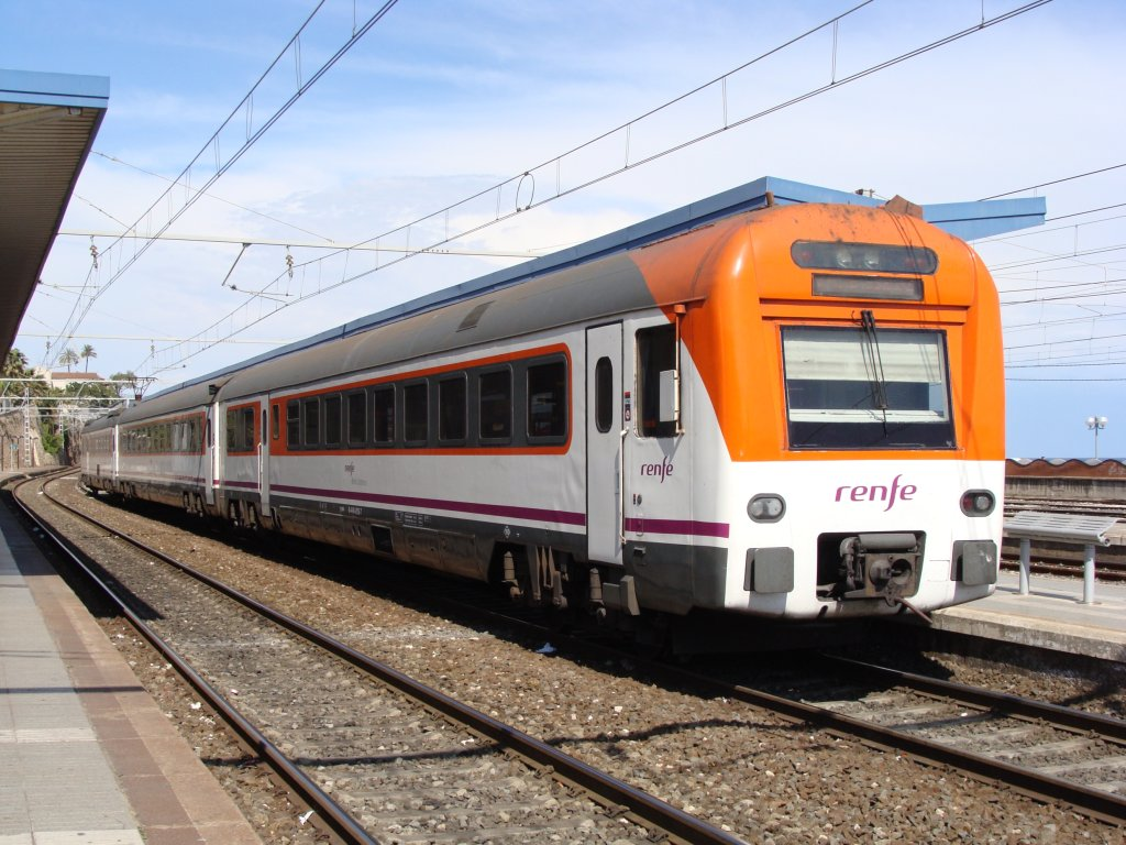 Unidad 448.025 estacionada en la estación de Tarragona en dirección Barcelona.